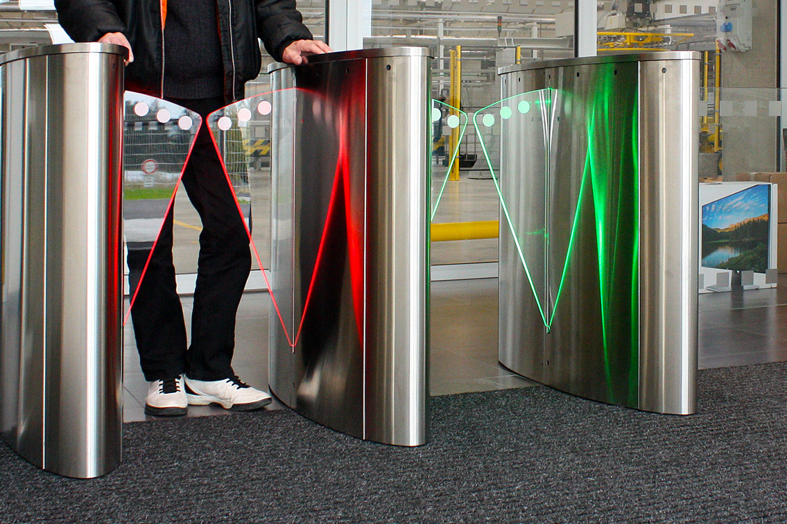 Druh turniketu, který signalizuje povolení či zamítnutí vstupu